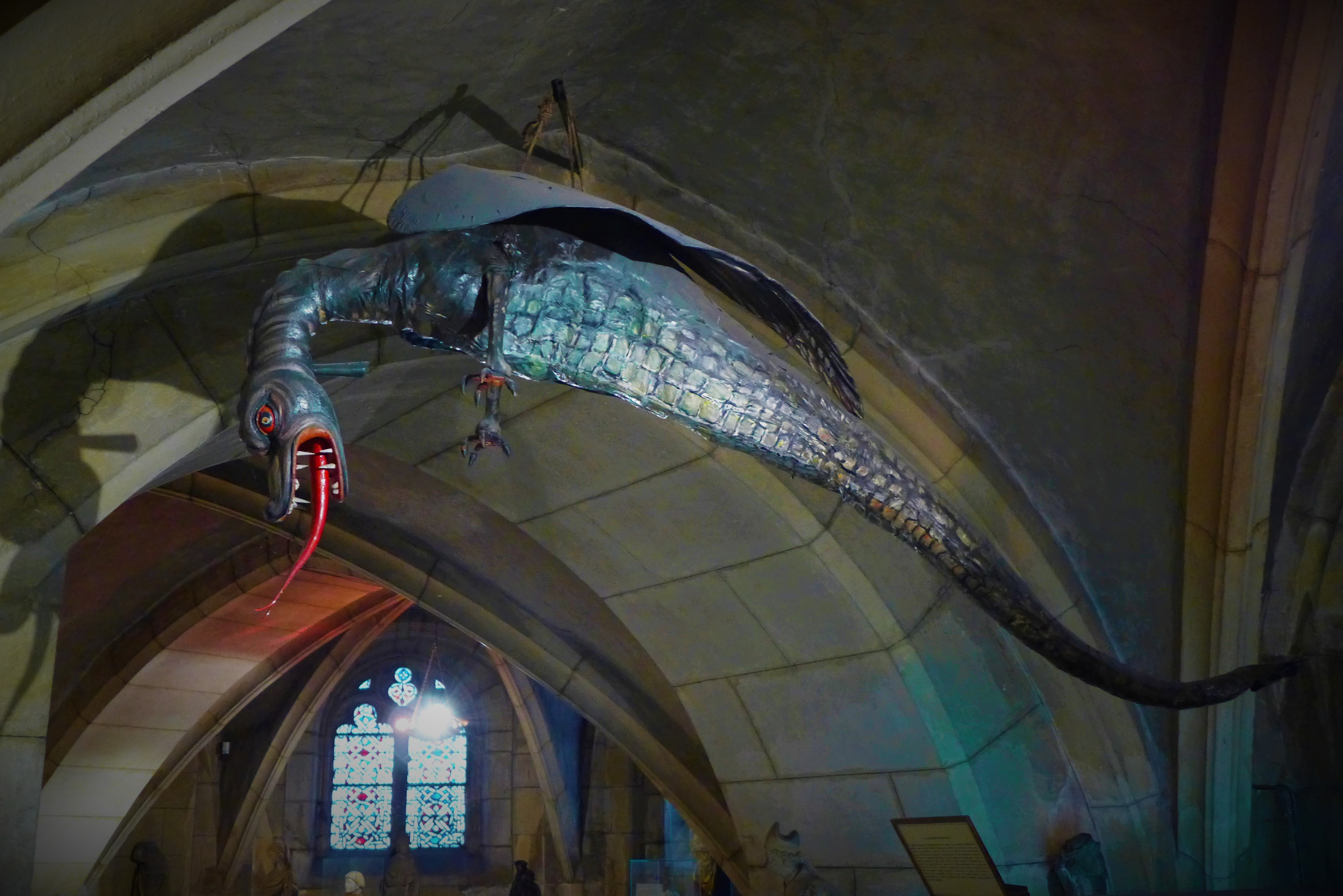 Grauli-Figur am Gewölbe der Metzer Domkrypta